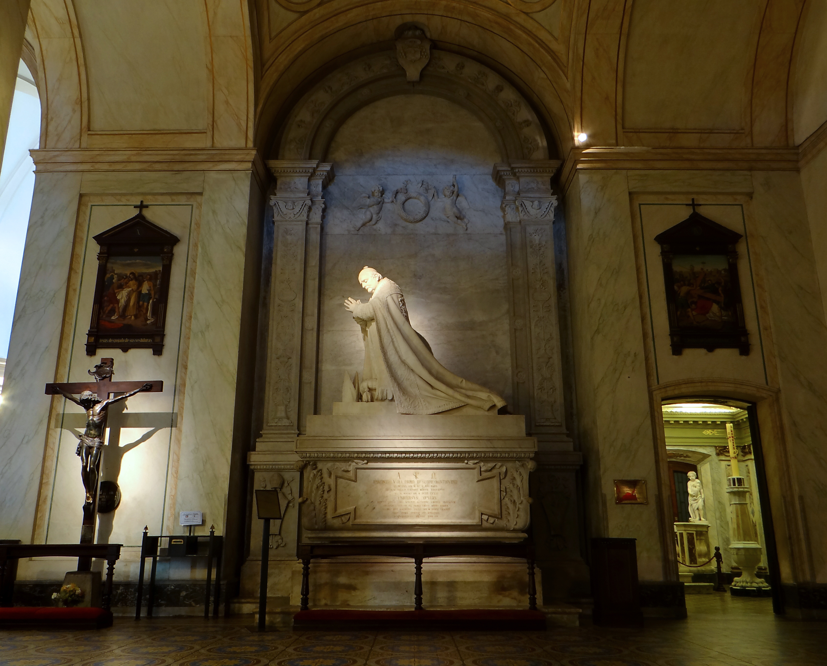 Catedral Metropolitana de Montevideo. Ubicada en el departamento de Montevideo